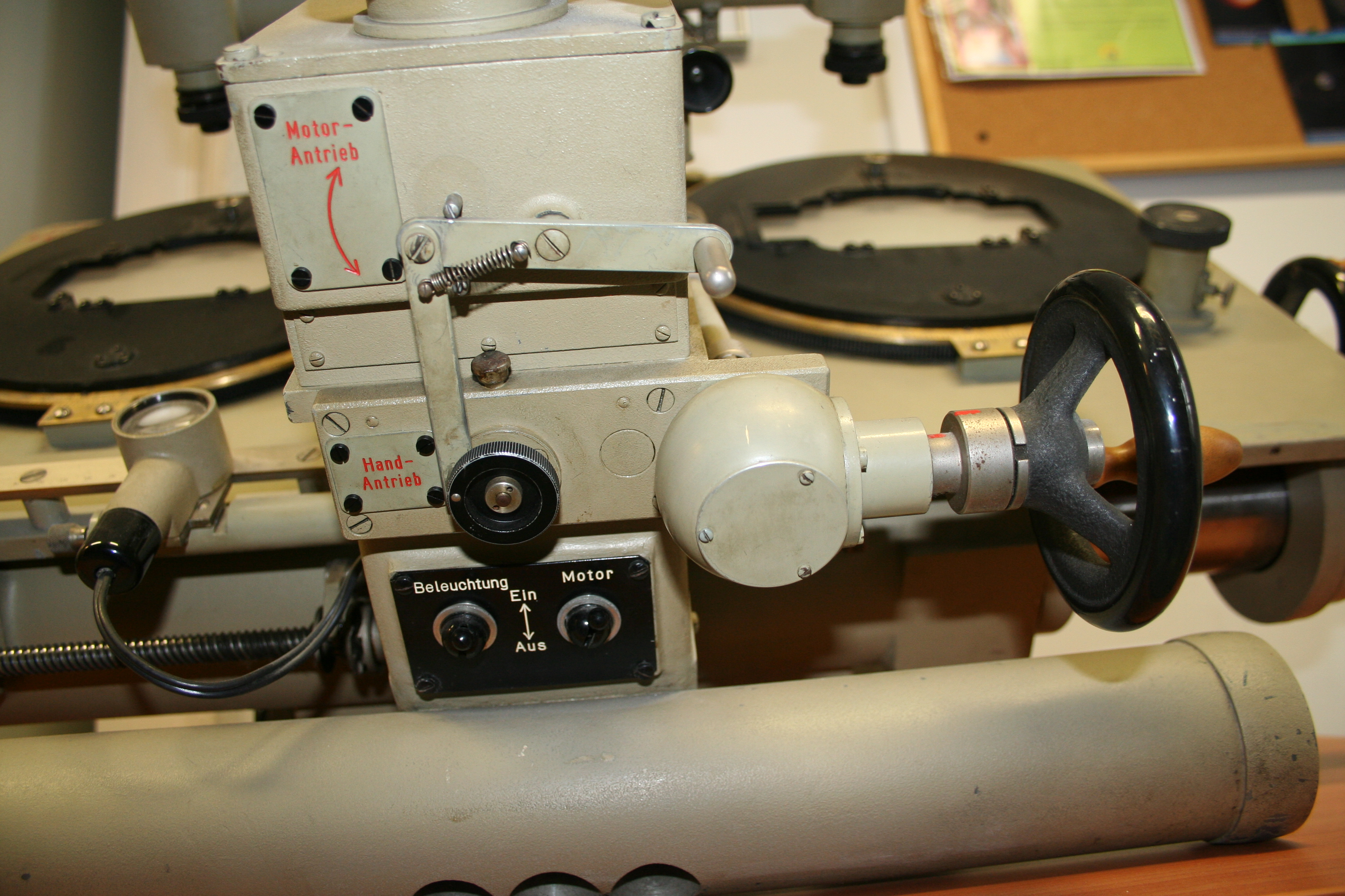 Komparator - zbliżenie